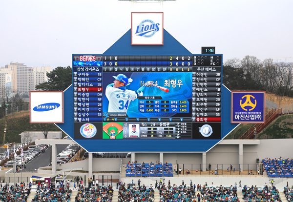 삼성라팍 2017